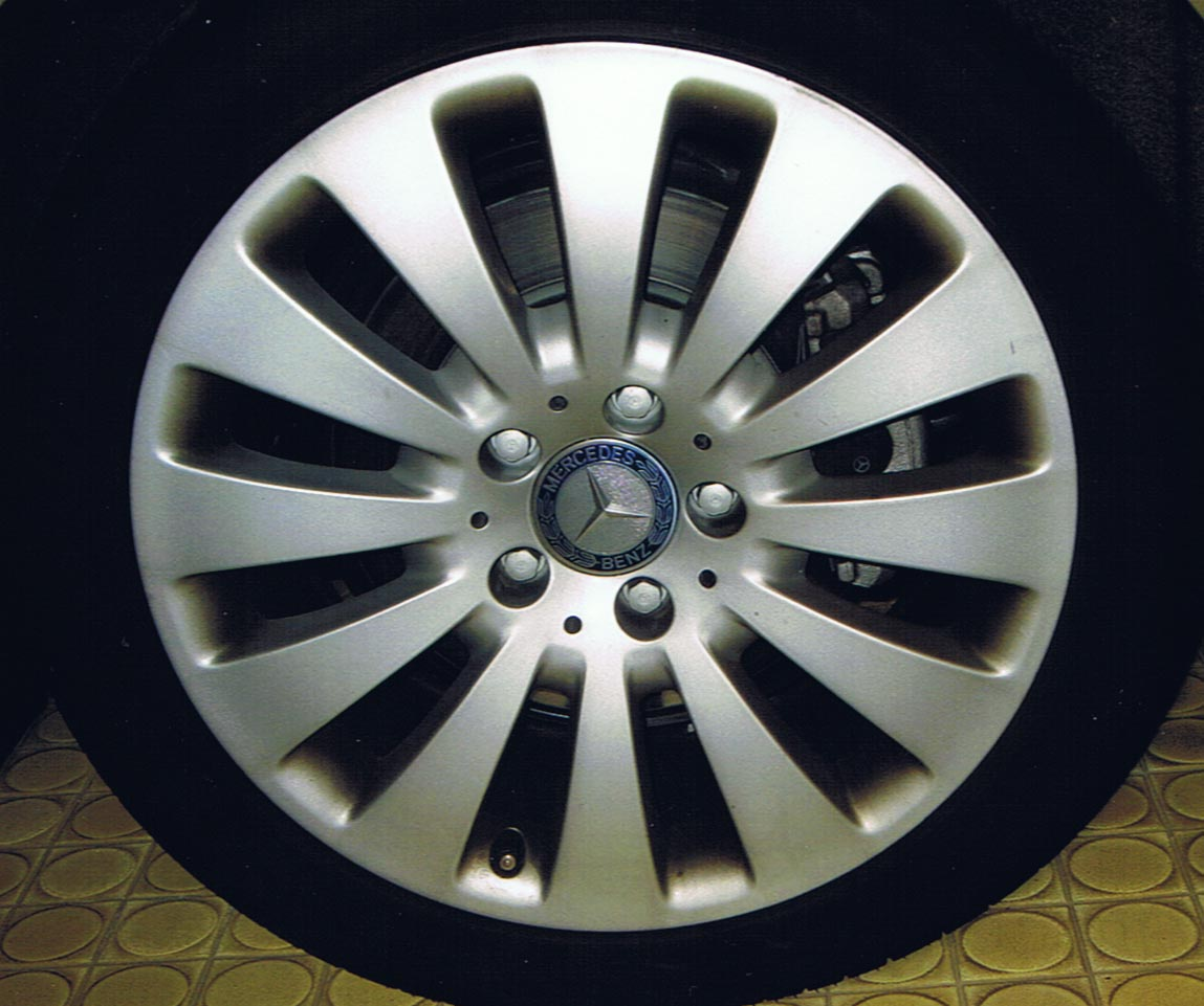 Radfelge für PKW aus Aluminiumlegierung - Niederdruckguss